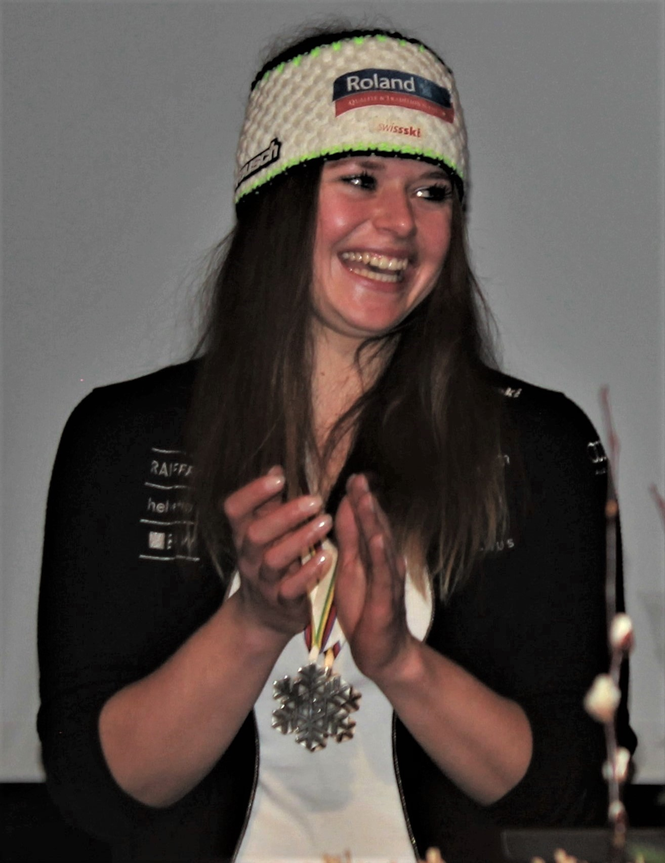 Die Schweizer Skirennfahrerin Corinne Suter am Empfang in Schwyz nach dem Gewinn einer Silber- und Bronzemedaille an der Ski-Alpin-Weltmeisterschaft 2019 in Åre.